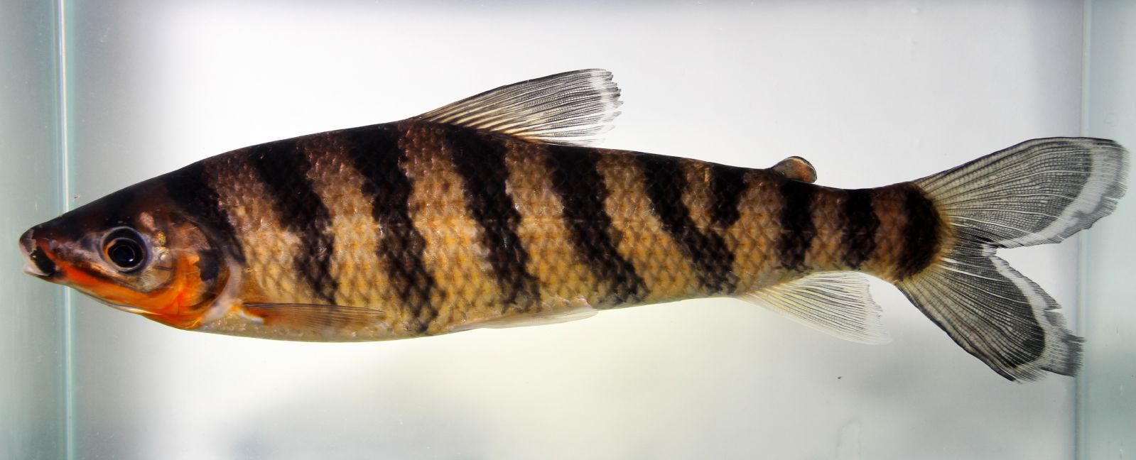 Anostomidae Leporinus cf fasciatus